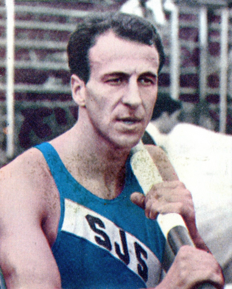 CAMPIONI DELLO SPORT 1968/69-n. 59 - PAPANICOLAU -GRE-Rec